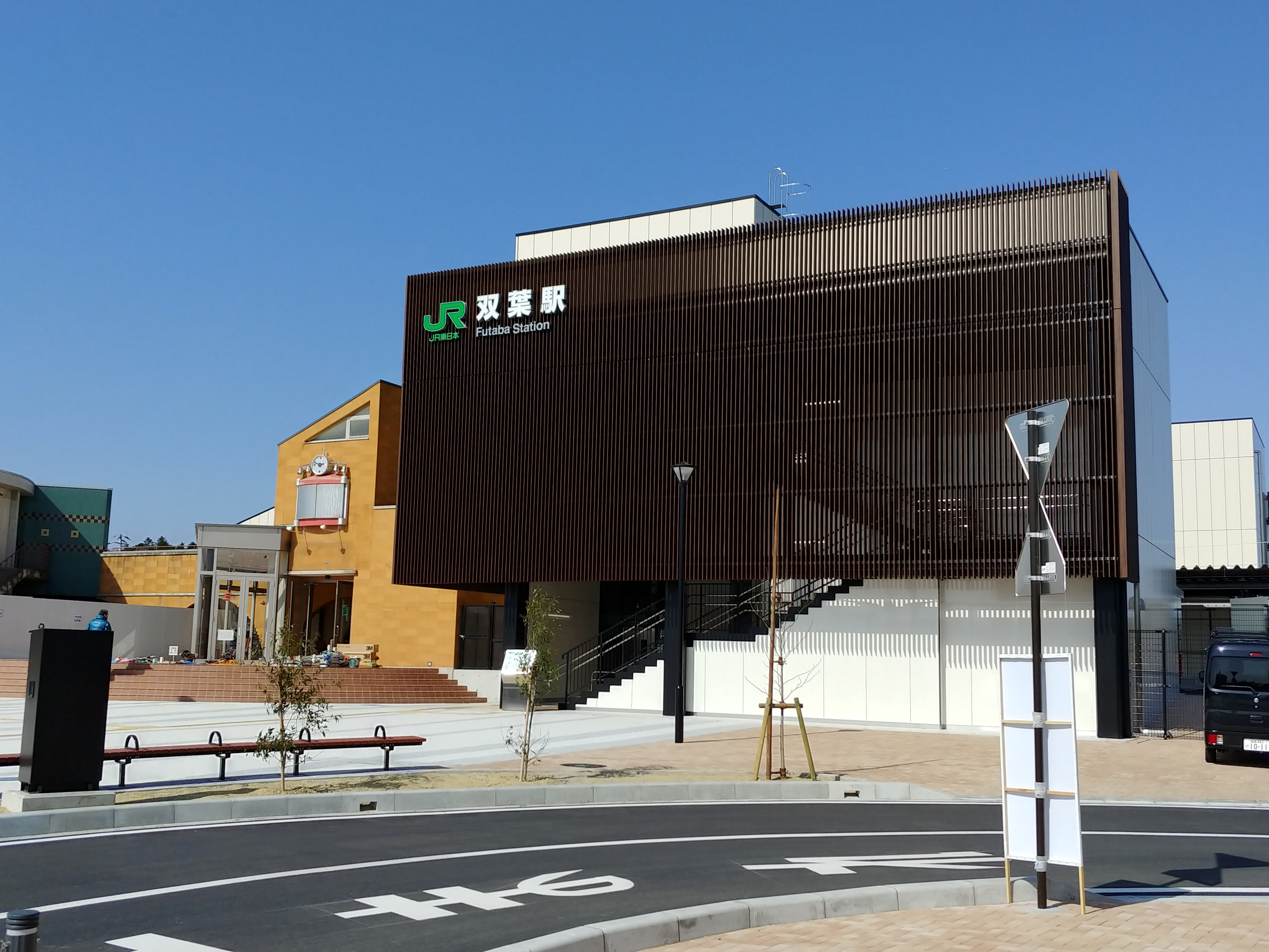 JR双葉駅東口新駅舎。